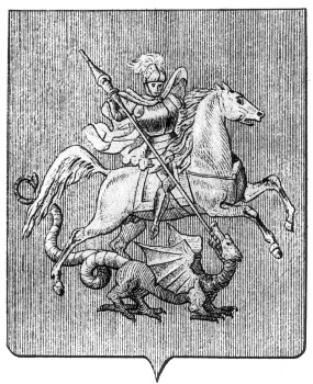 Герб Москвы. Утвержден 20 декабря 1781 г.